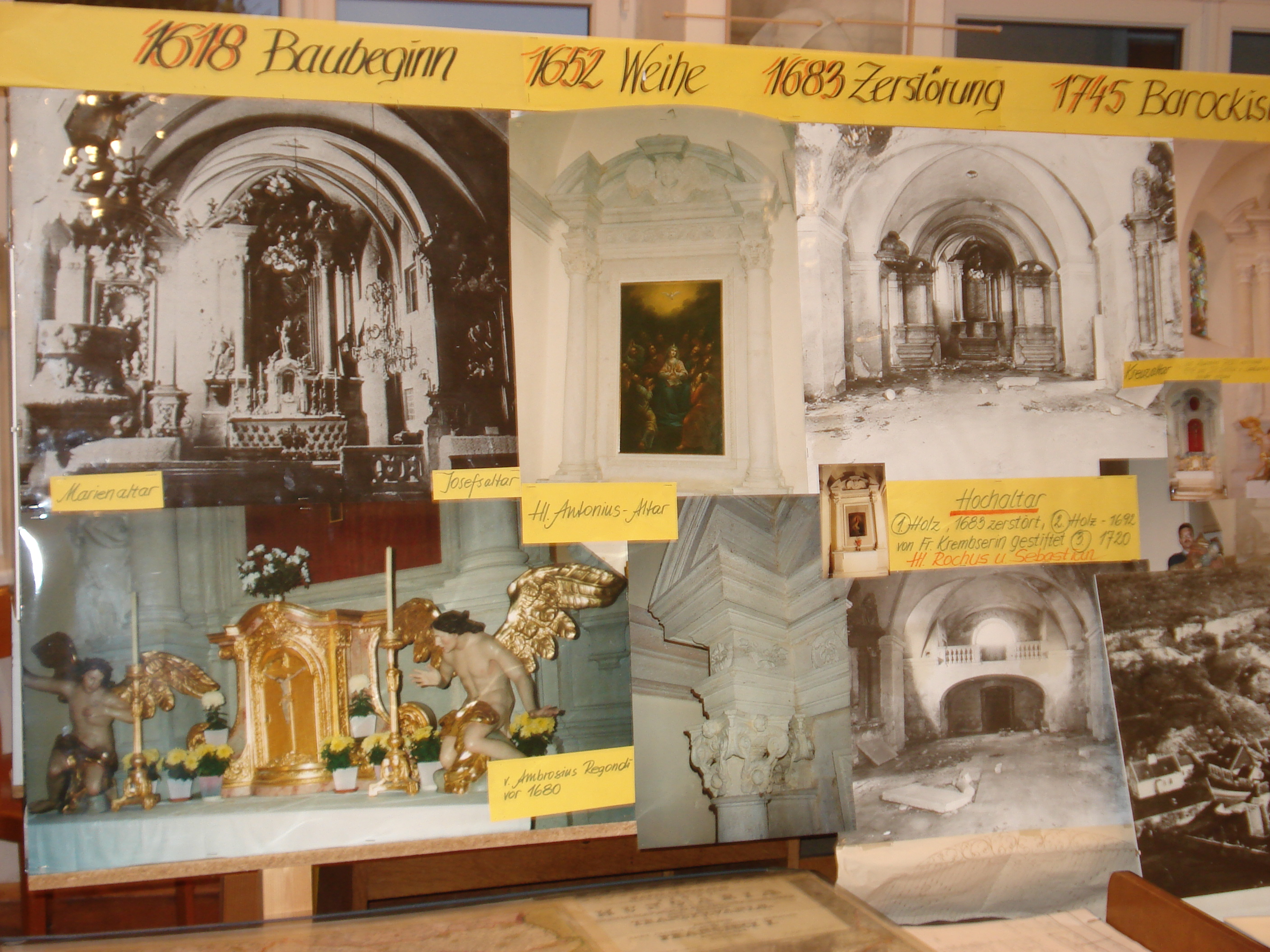 Kirchendoku_im_Museum